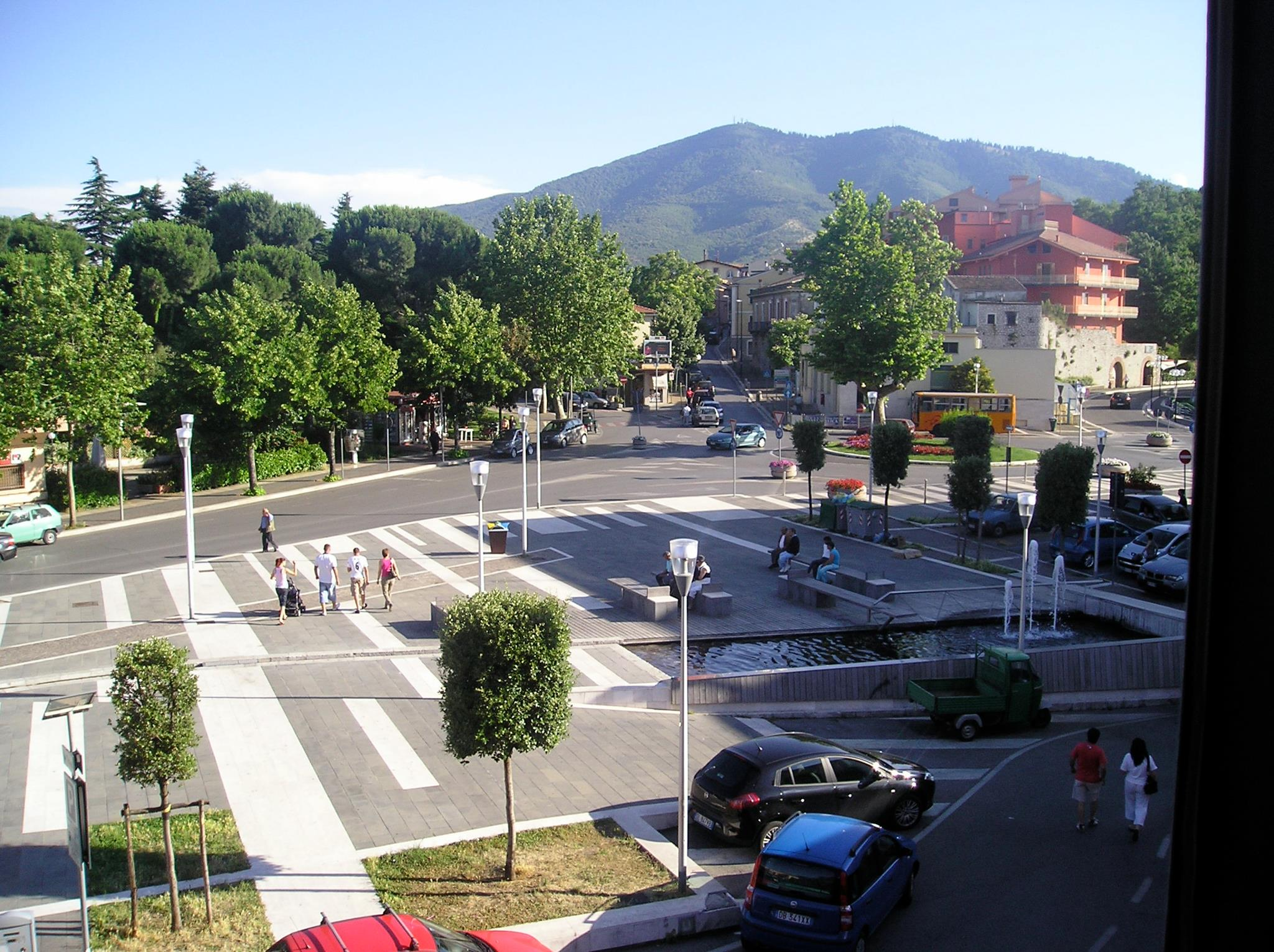 Piazza Abele Mancini, Melfi (Basilicata)